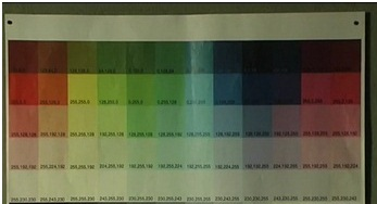 Compresión realizada con el códec MPEG4.